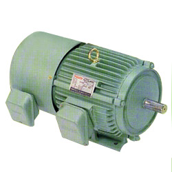 AC motor